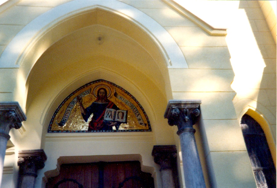 Mozaikkép a dunakeszi Nepomuki Szent János (Lovaregyleti) kápolna bejárata felett